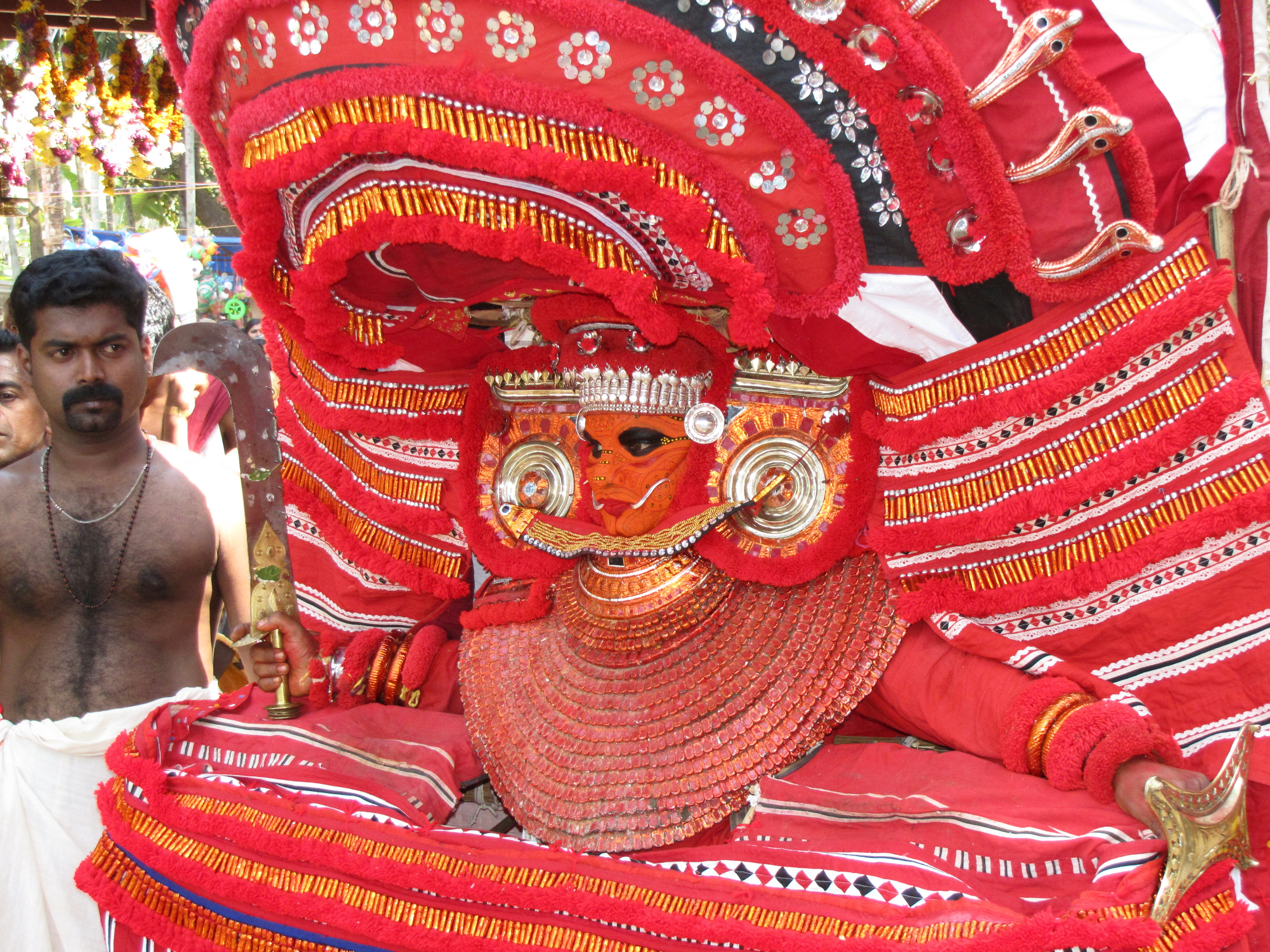 Chukannamma Theyyam